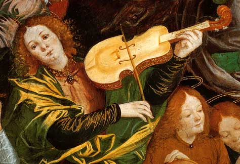 Viola da braccio en un fresco de Gaudenzio Ferrari en Santa Maria dei Miracoli